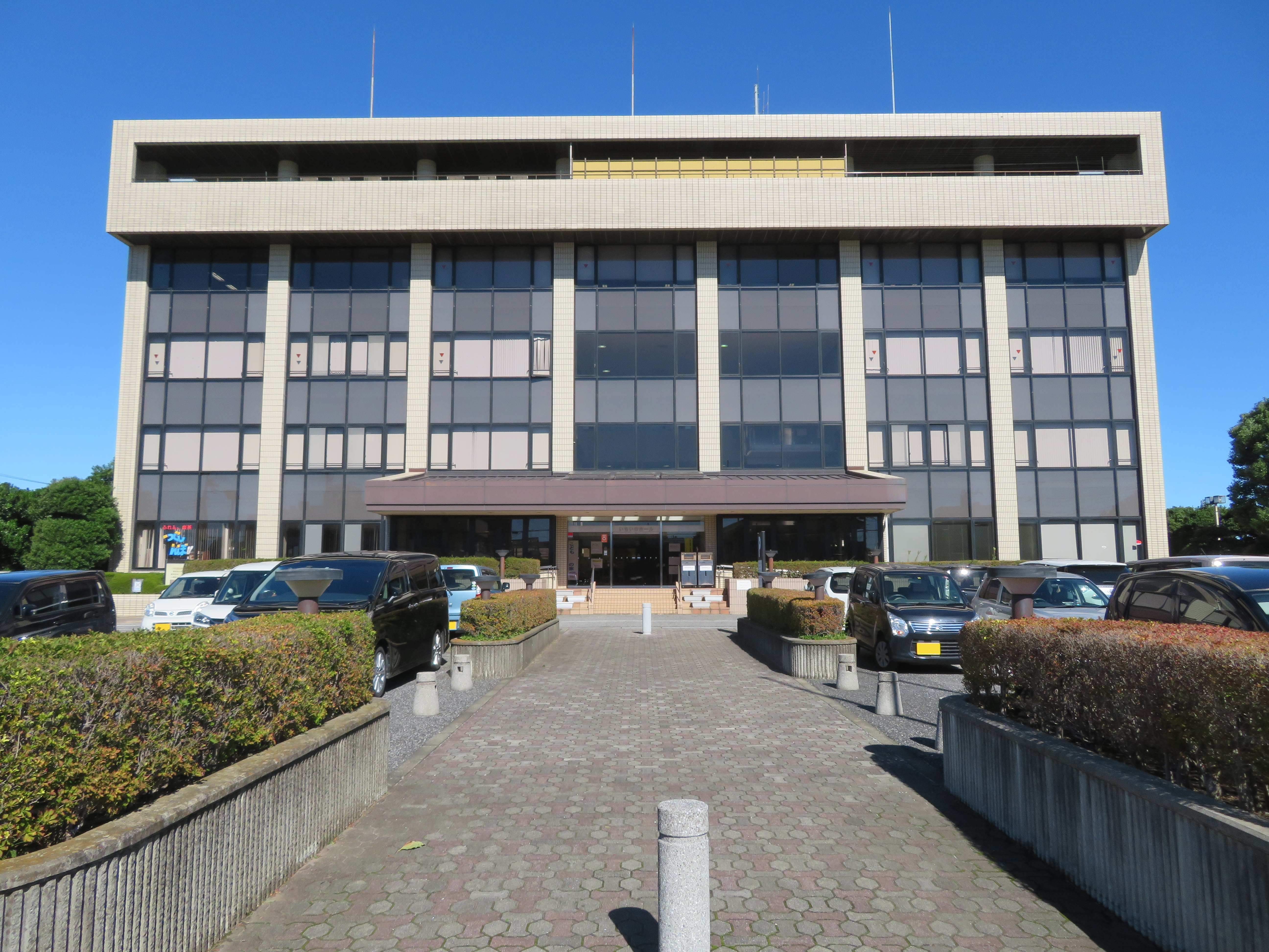 千葉県野田市に所在するいちいのホール（旧 関宿町役場庁舎）